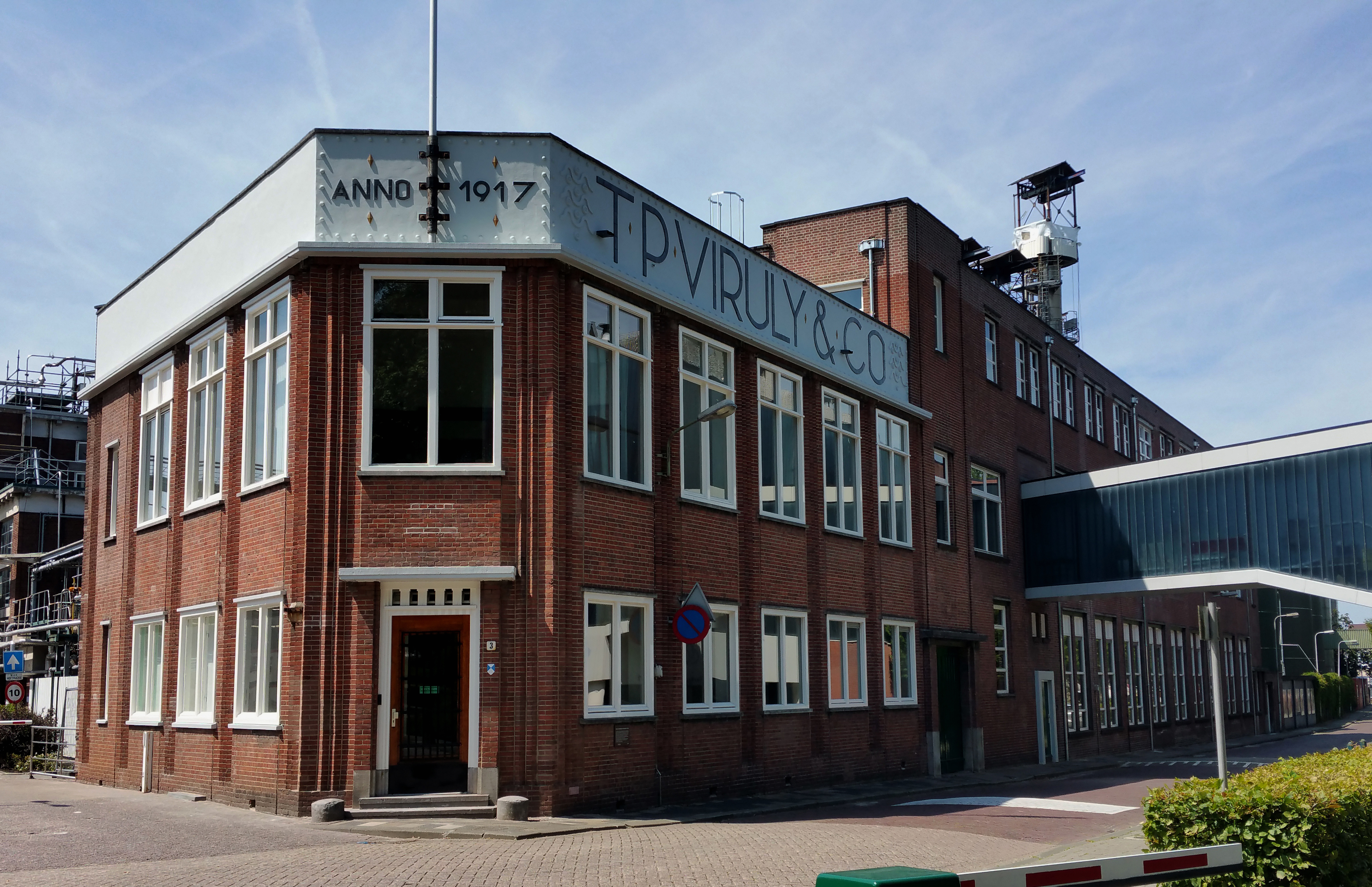 Kaarsenfabriek Gouda. Gebouw T.P. Viruly & Co. Anno 1917